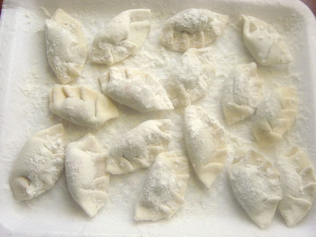 Aspetto dei tortelli cremaschi da crudi